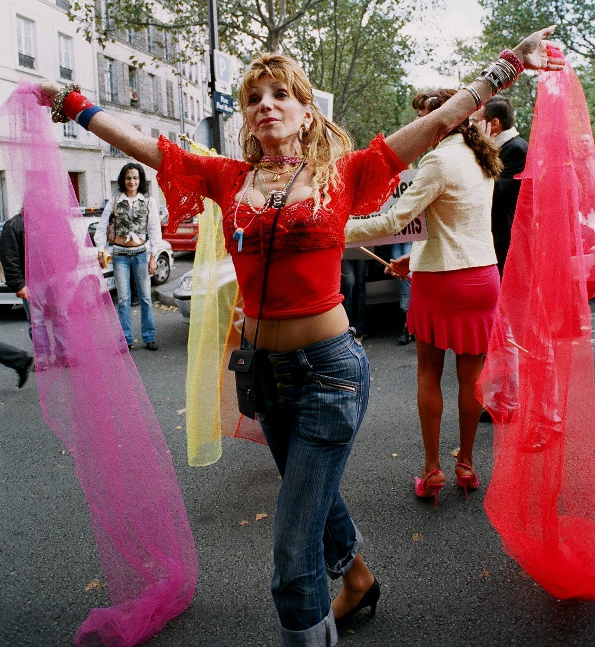 Dr. Camille Cabral, une activiste des Transgenres à une manifestation pour les Trans à Paris en France